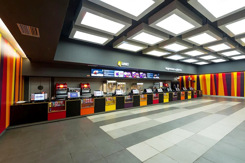 Entrada do Cineflix JK Shopping, de Taguatinga, DF